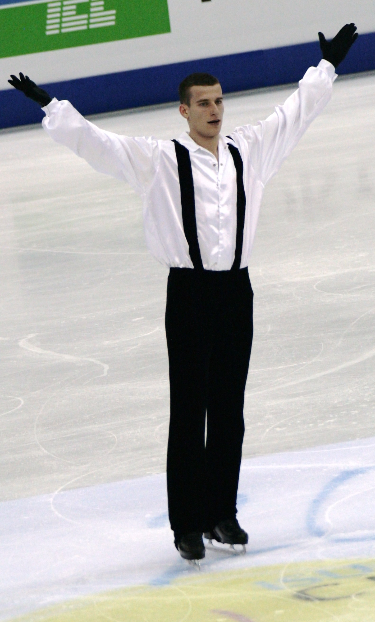 Мартон Марко (Венгрия) на чемпионате мира по фигурному катанию 2012